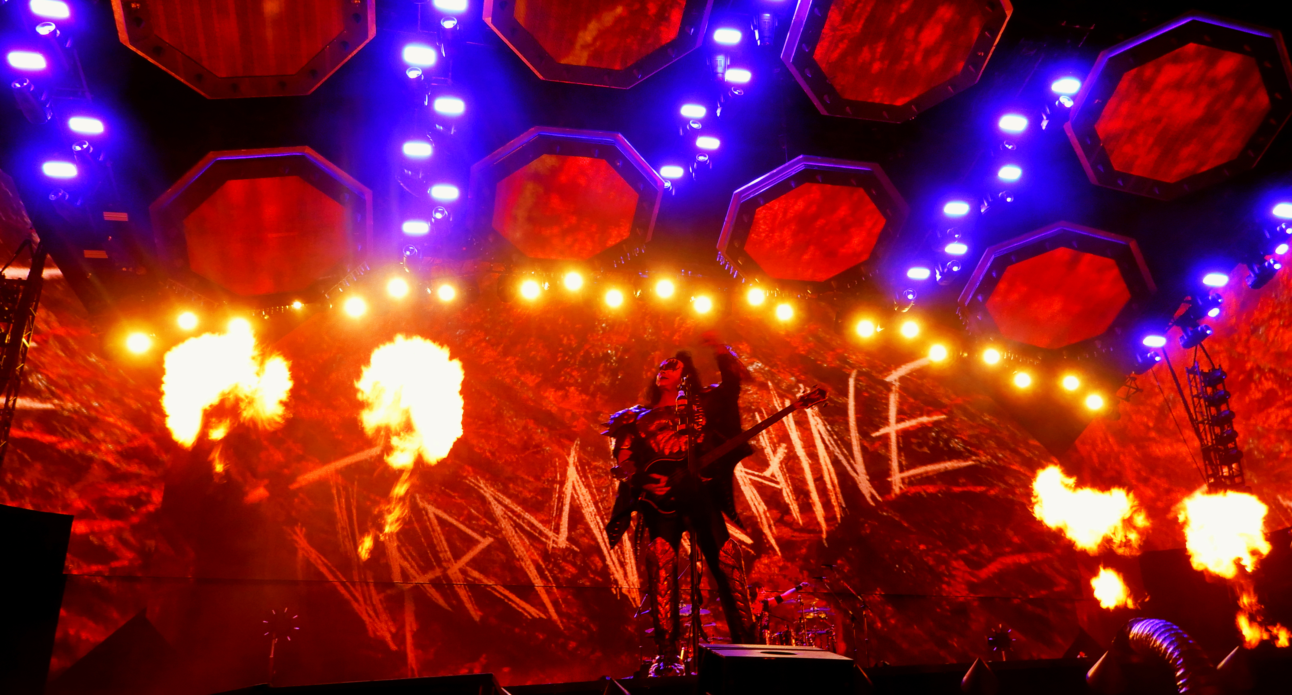 Gene Simmons (Kiss) au Hellfest 2019 pendant War Machine